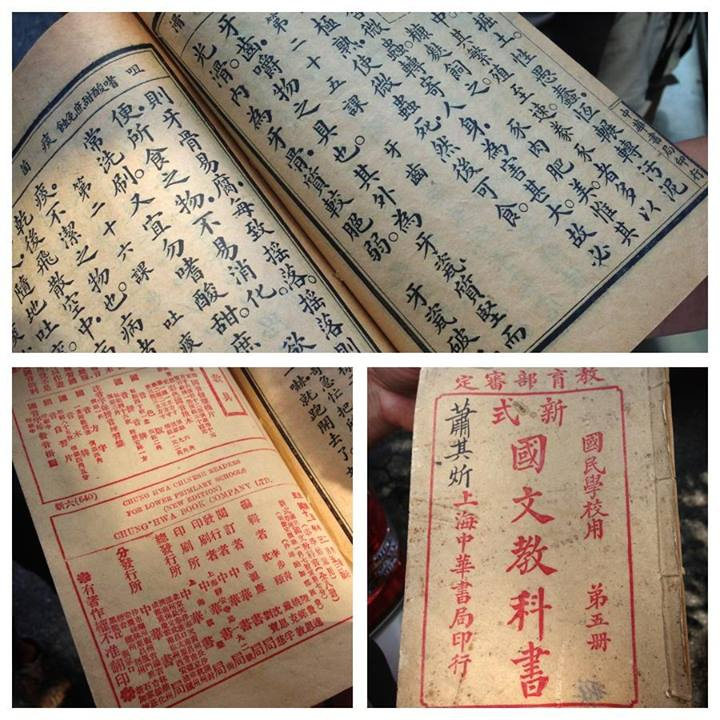 1911年新加坡華校所採用的中文課本（國文），主要來自中華民國，並且仍是文言文文體 (The Chinese textbook used in Singapore's Chinese schools in 1911 came from Republic of China. It's written in Classical Chinese)